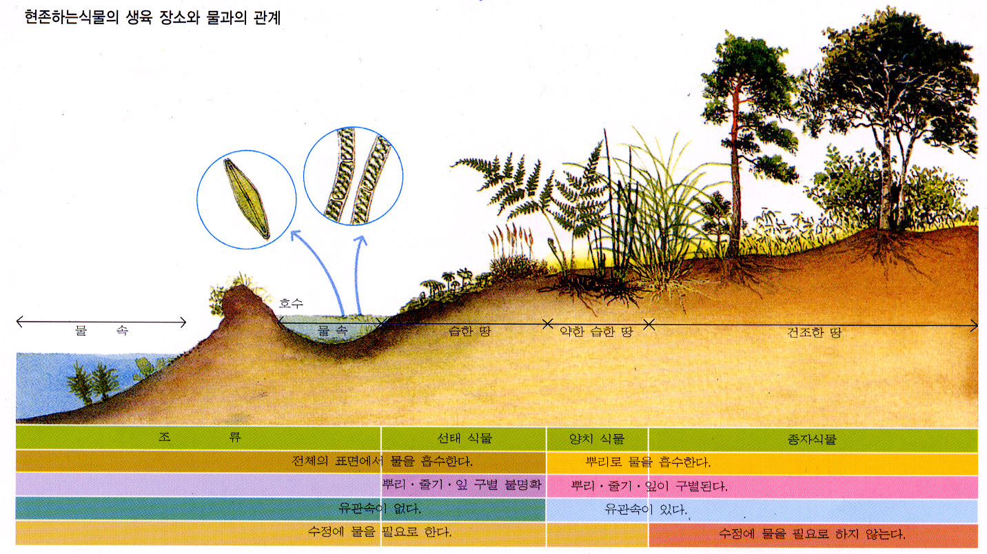 식물의 생육장소와 물과의 관계